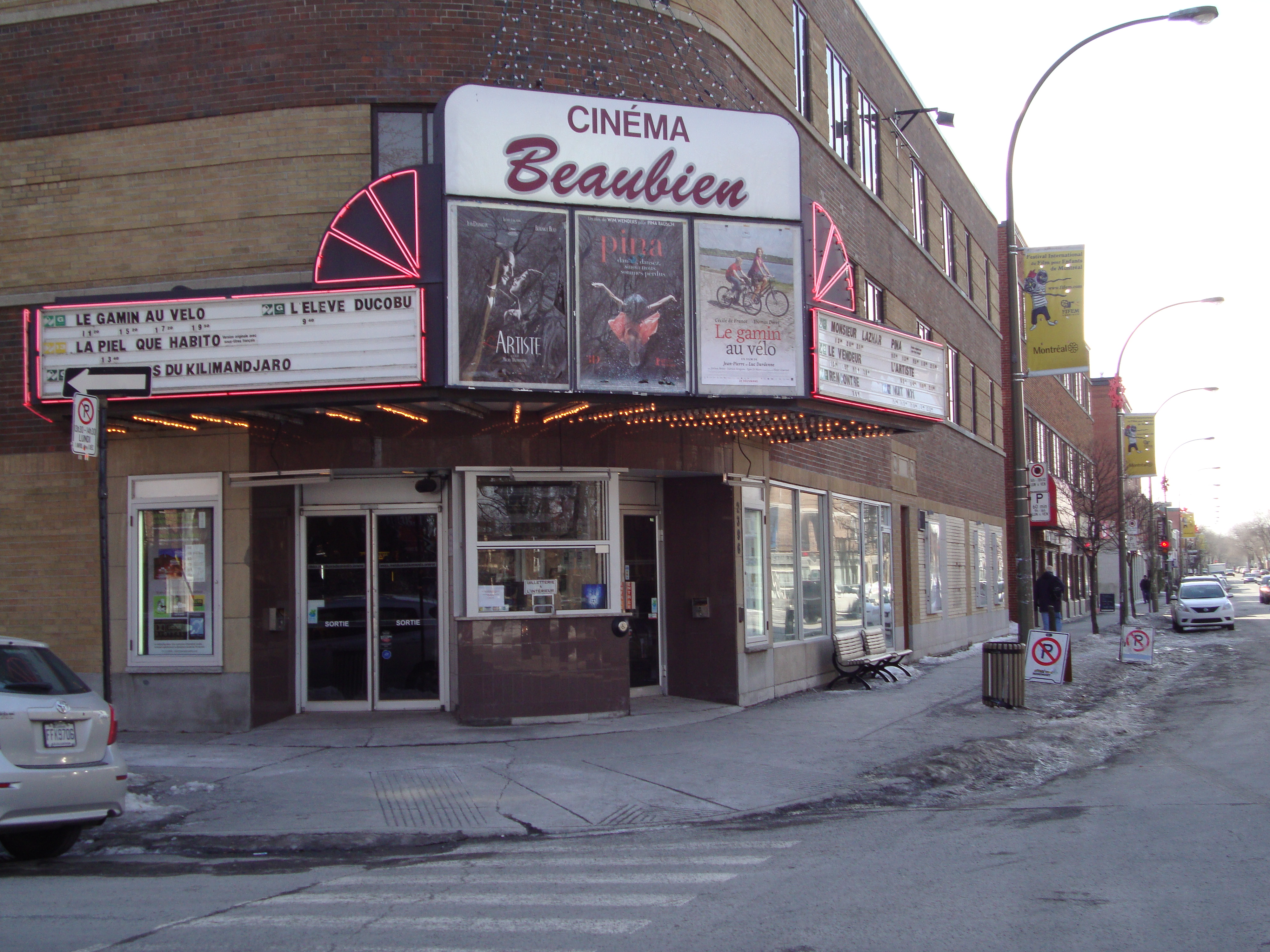 Cette photo représente l'un des seuls cinémas de quartier de la ville de Montréal.